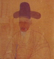 오음 윤두수 영정